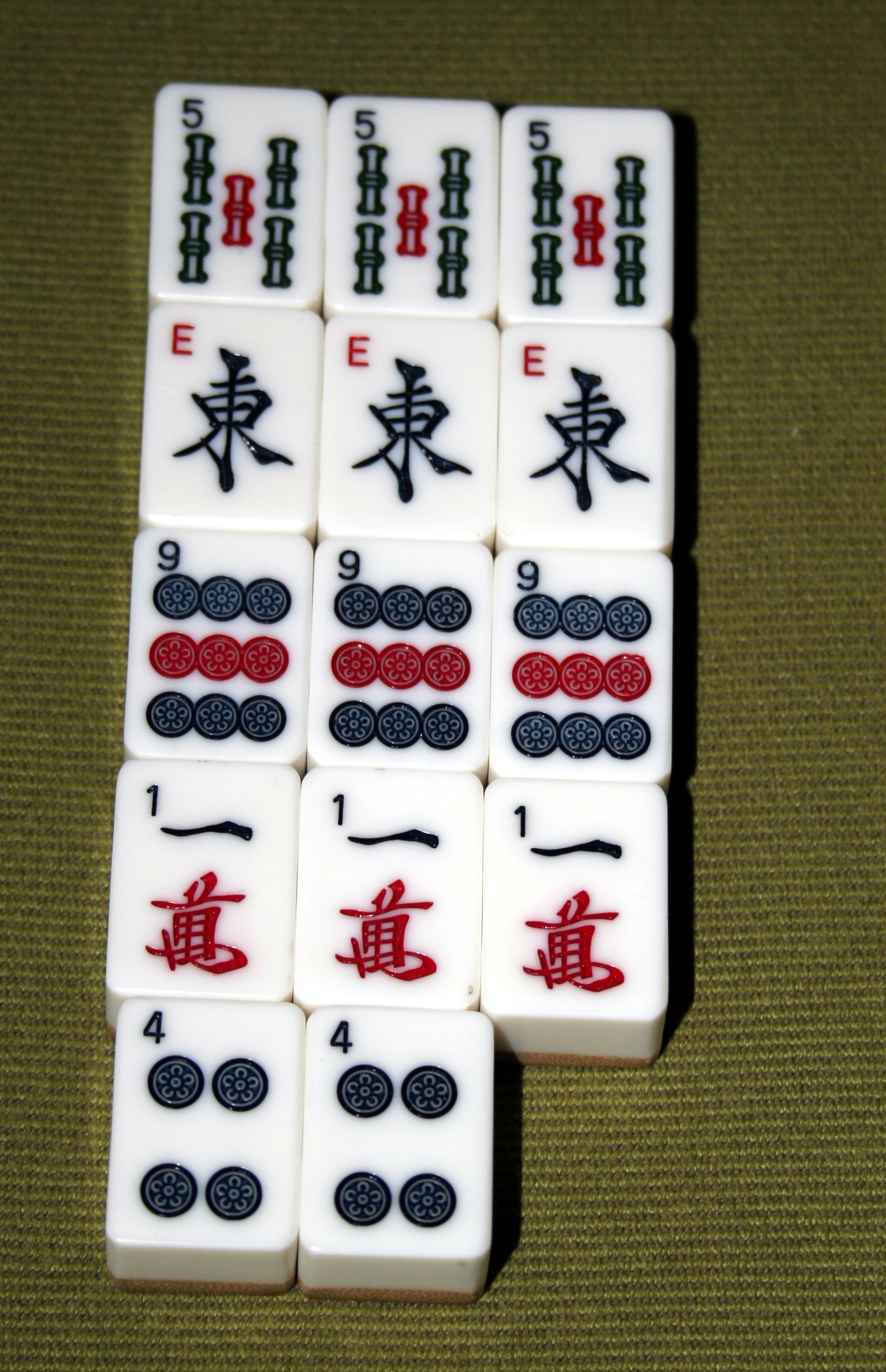 An ordinary Mahjong